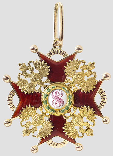 Kreuz 2.Klasse. Gold, emailliert. In den rs. Kreuzarmen Punze "IL" für einen unbekannten Werkstattmeister bei Juwelier Eduard und Punze "Eduard". Die Öse mit Feingehaltspunze für "56" zolotniki. Größe 48 x 50 mm, Gewicht 17,8 g, altes, konfektioniertes Halsband. Ein Adler in der Tragezeit ergänzt. Dazu das rote Verleihungsetui mit aufgedrucktem, heraldischem Adler und Klassenbezeichnung.